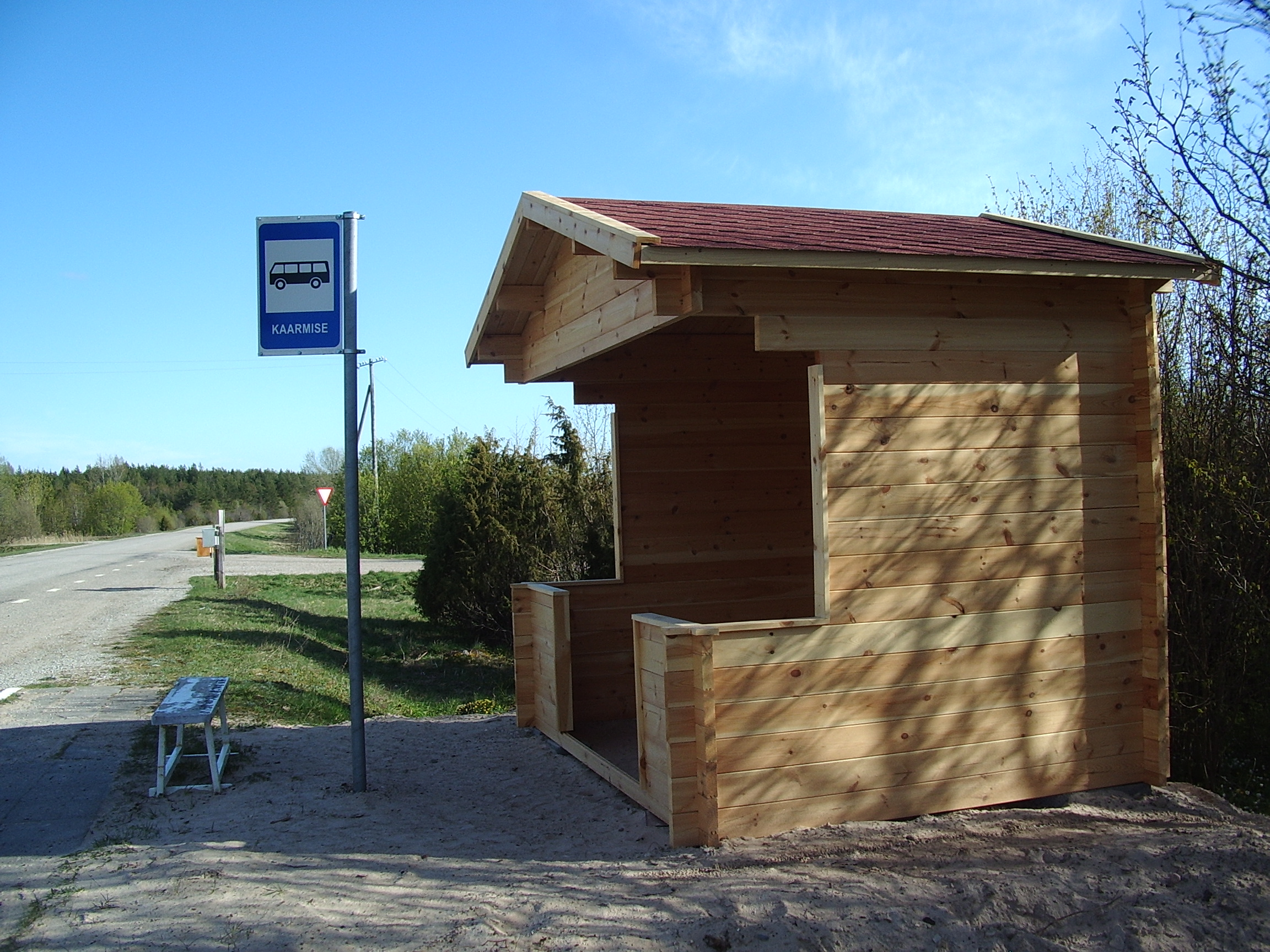 A bus stop at village Kaarmise, Saare County, Kaarma parish